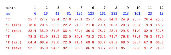 Table des enregistrements climatiques